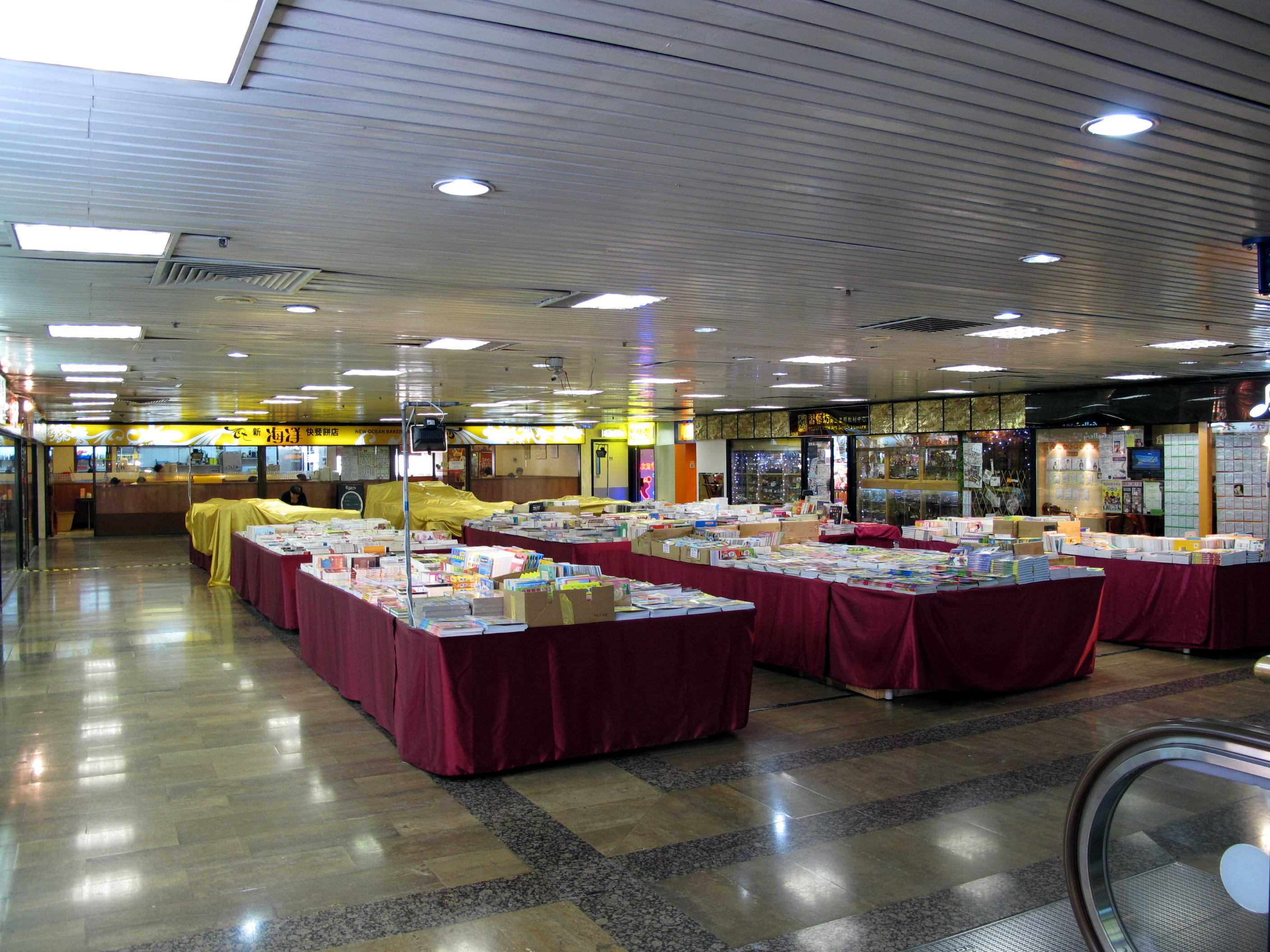 Jubilee Garden (Hong Kong)